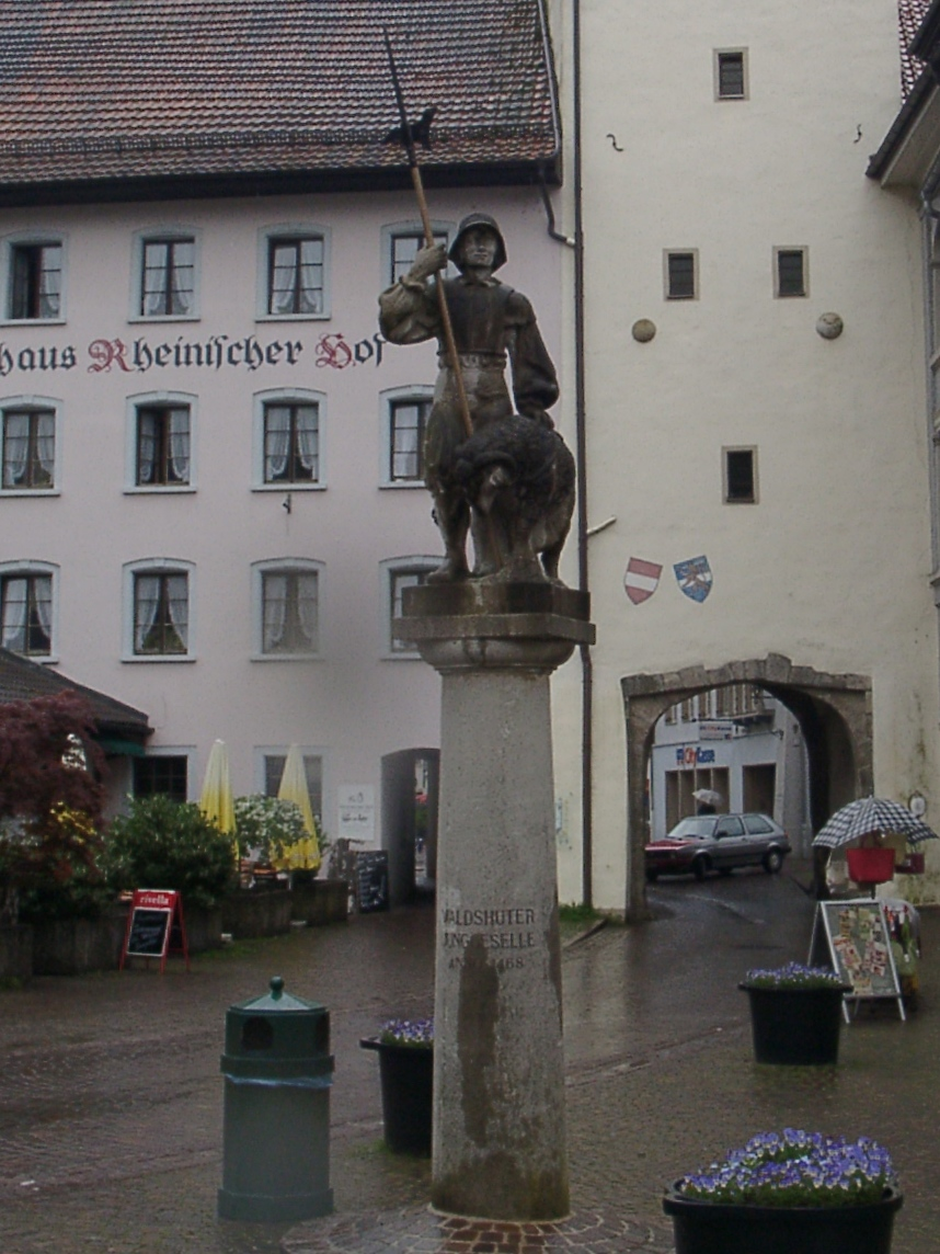 Waldshut, Stadttor; Skulptur "Steinerner Junggeselle" von Guta von Freydorf-Stephanow